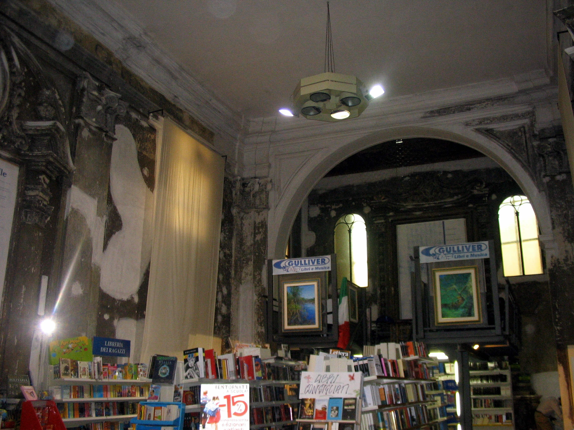 Rieti, Lazio, Italia